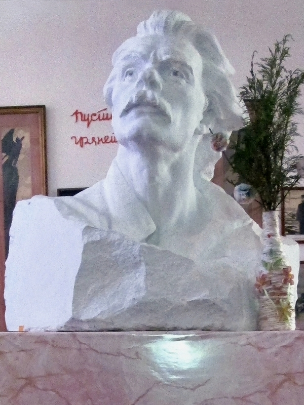 Погруддя М. Горького з колекції Мануйлівського літературно-меморіального музею Максима Горького, зал № 1 (с. Верхня Мануйлівка, Козельщинський район, Полтавська обл., Україна). Скульптор М. А. Красотін (1927-1989); білий мармур.